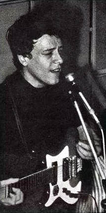 Revista "Periscopio", 1970.